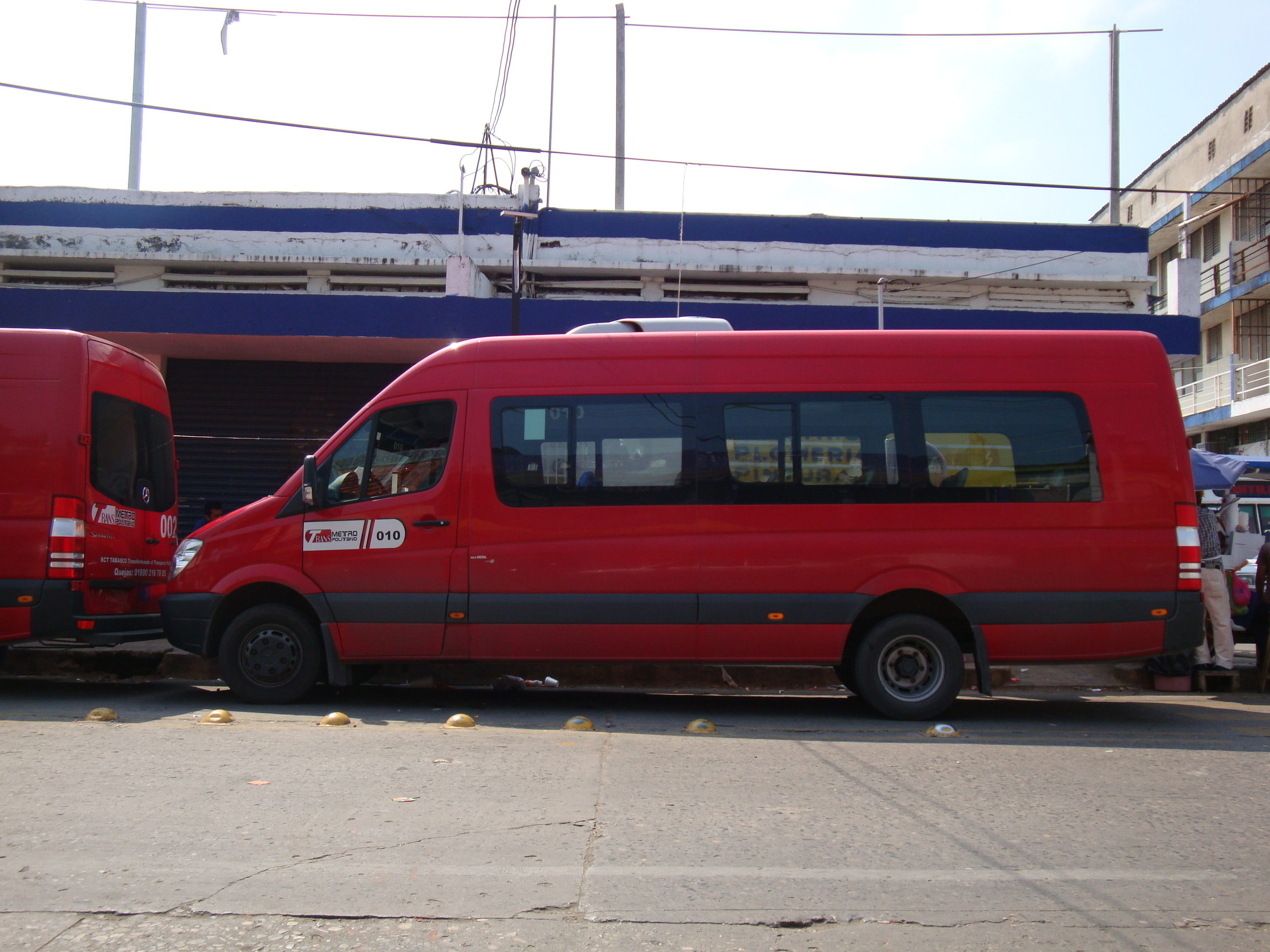 Unidad de Transporte denominada "Transmetropolitano", ópera Cual el en la zona metropolitana de la Ciudad de Villahermosa, Tabasco, México.